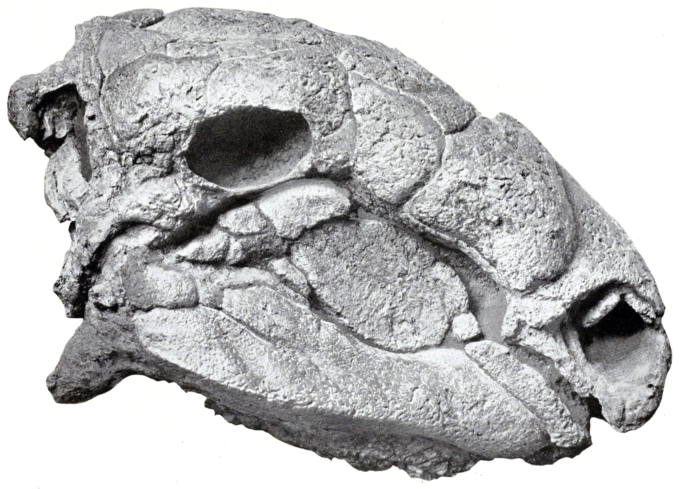 Panoplosaurus mirus skull.